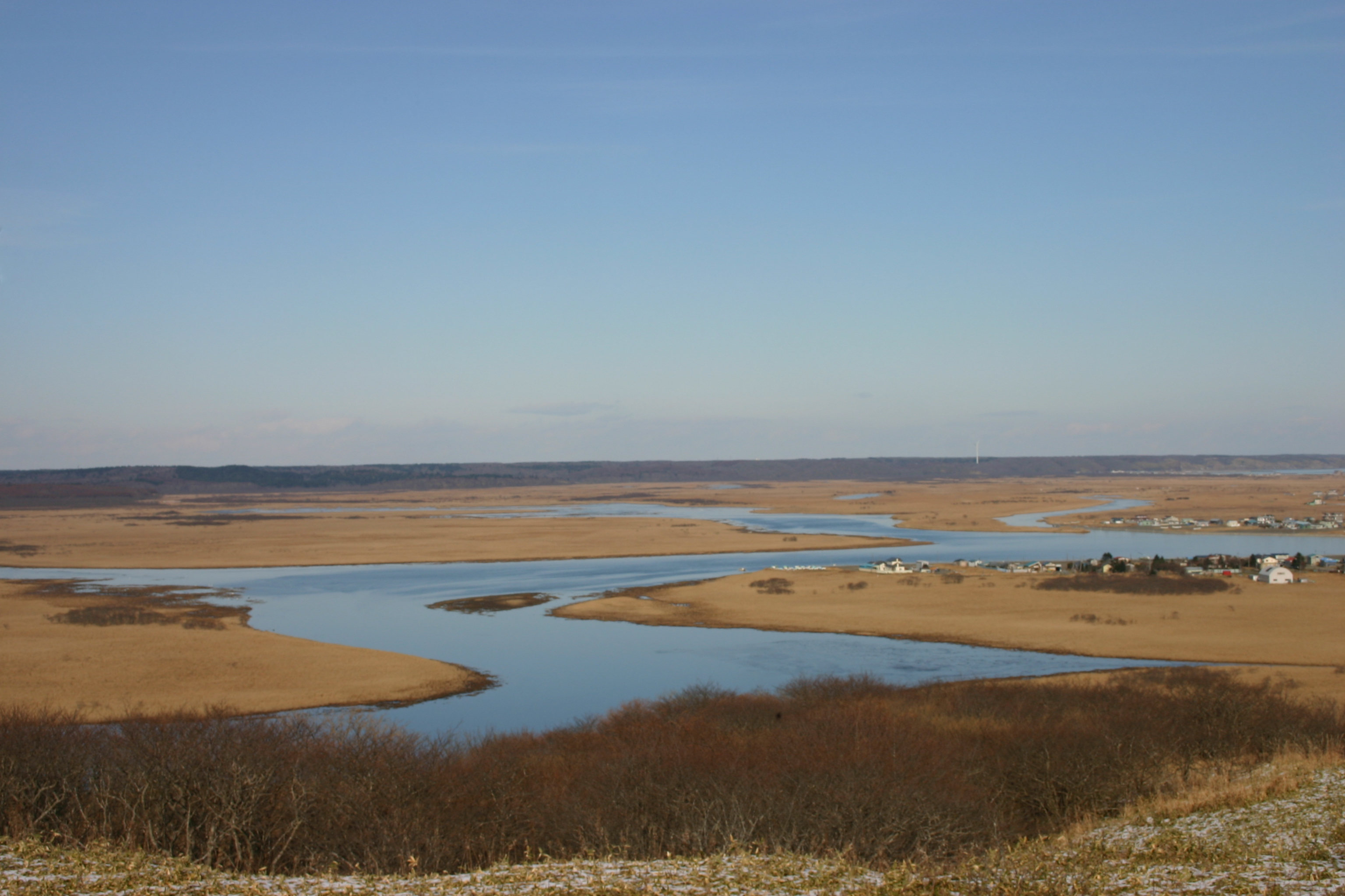 琵琶瀬展望台からの霧多布湿原